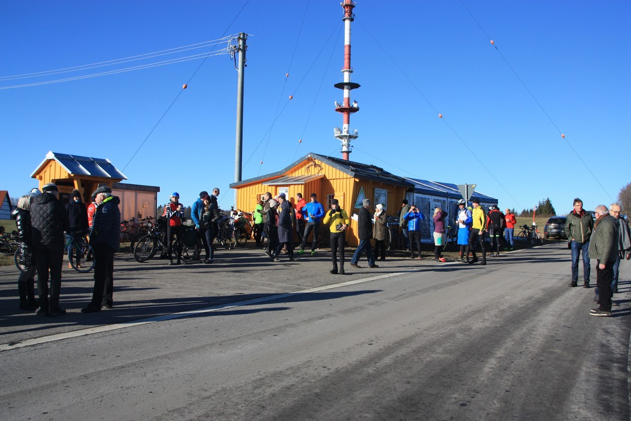 Grand Opening 2017 / jährliche Saisoneröffnung